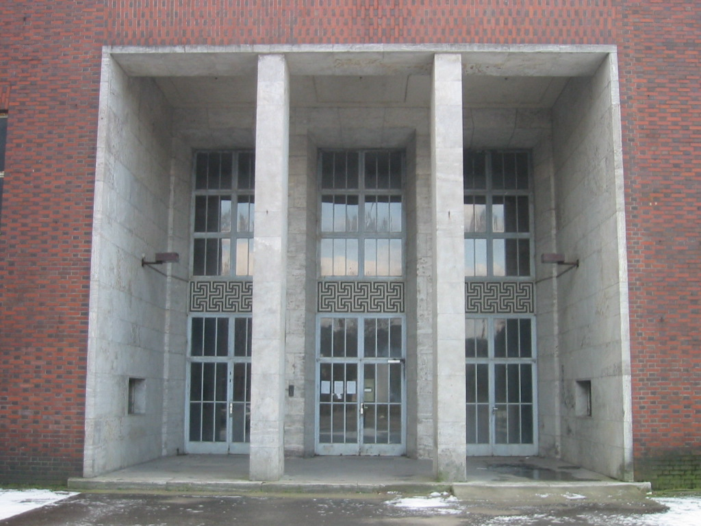 Zechengebäude Grube Reden